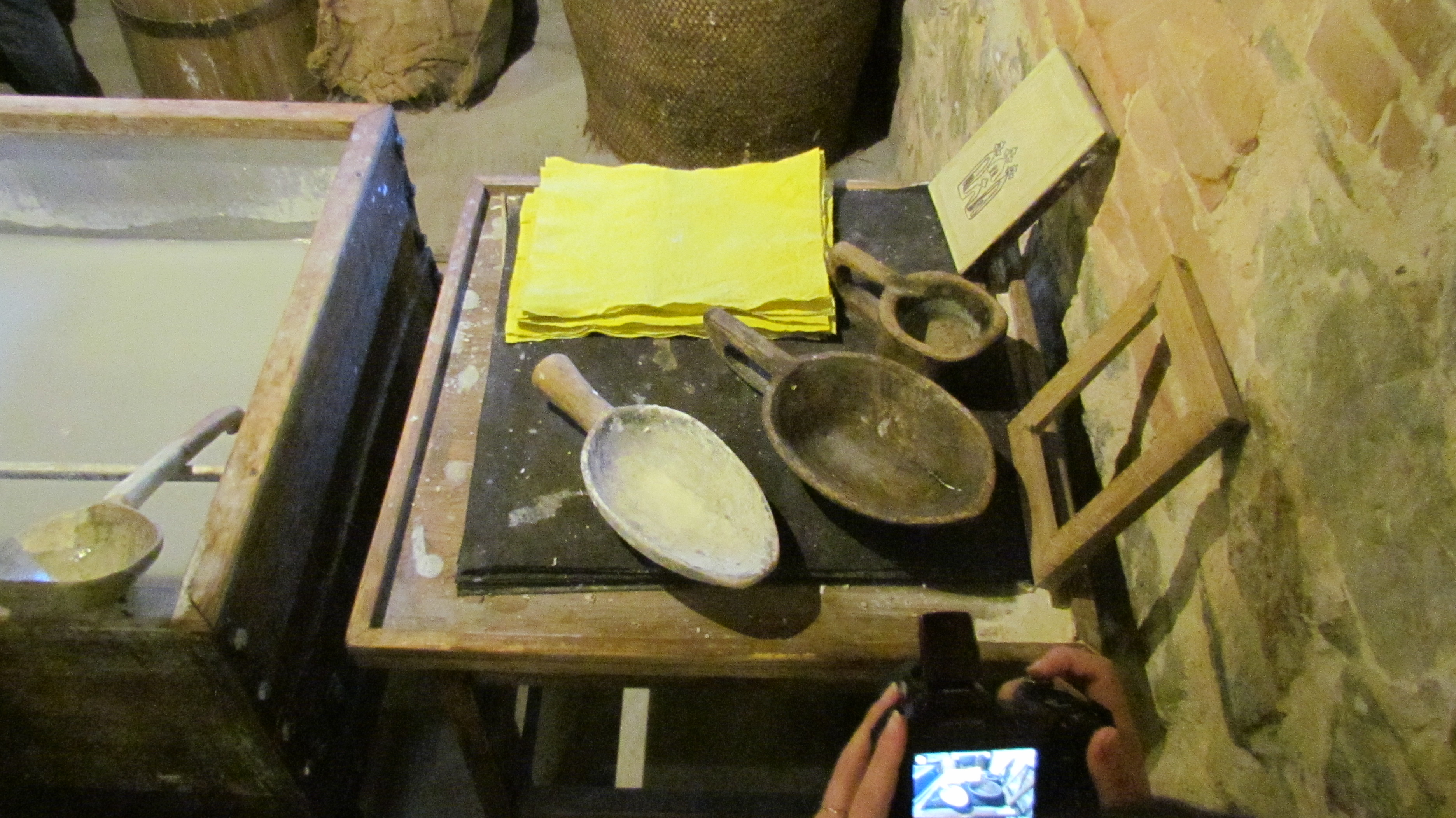 Папірня в Радомишлі. Частина експозиції